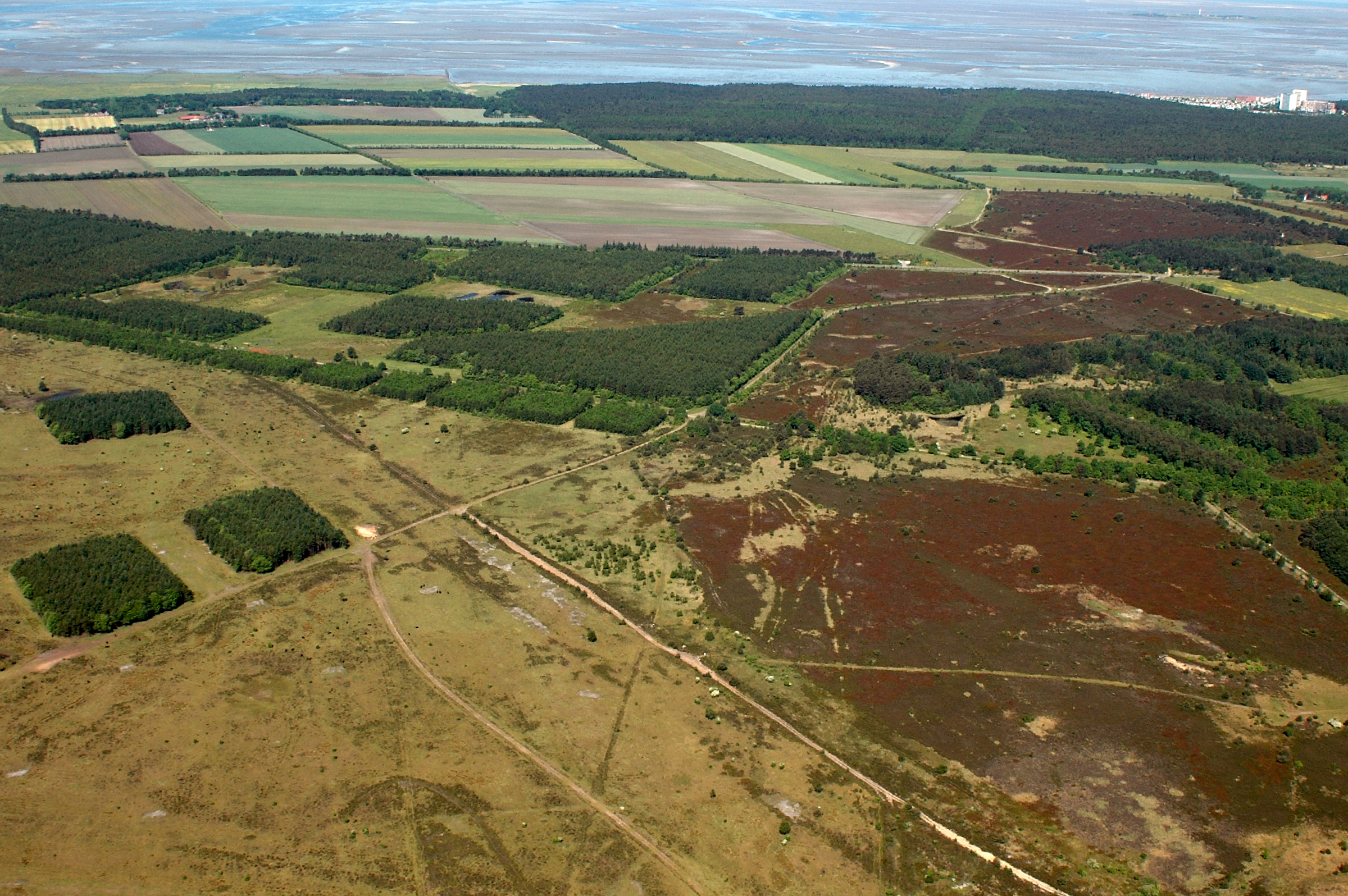 Fotoflug vom Flugplatz Nordholz-Spieka über Cuxhaven und Wilhelmshaven Altenwalde, Niedersachsen, Deutschland